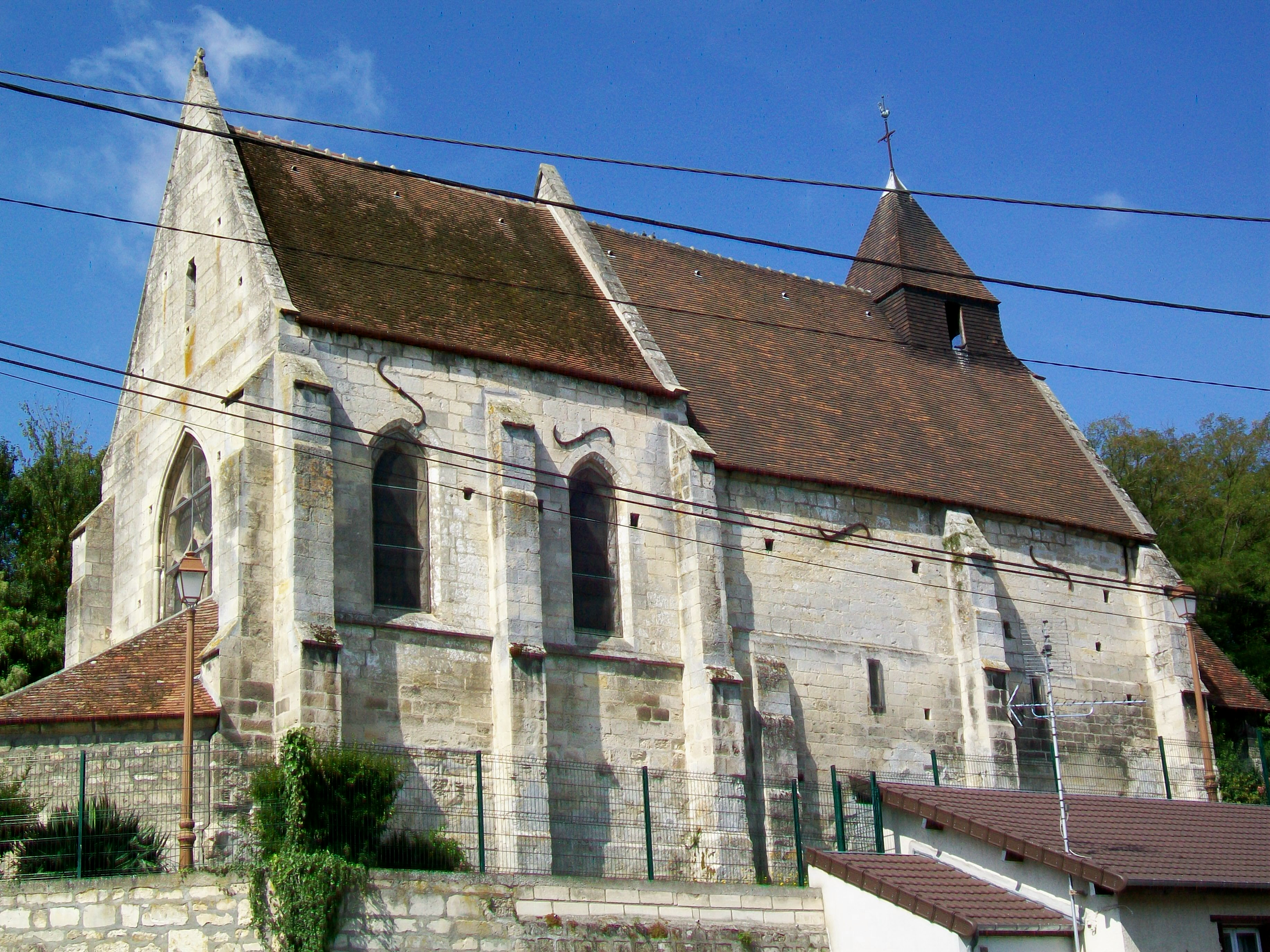 L'église Saint-Leufroy depuis le nord-est.